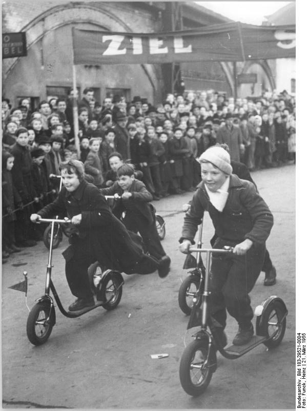 Zentralbild Funck 21.3.1955 Radrennen am Alex bei 0 Grad. Beim "Frühlingsfest" im Stadtbezirk Berlin-Mitte kamen bei Schneegestöber am Sonntag, dem 20.3.1955, nur die Sportbegeisterten auf ihre Kosten. UBz: Beim Rollerrennen um den Titel "Frühjahrsmeister des Stadtbezirks Mitte" entbrannten spannende Kämpfe.